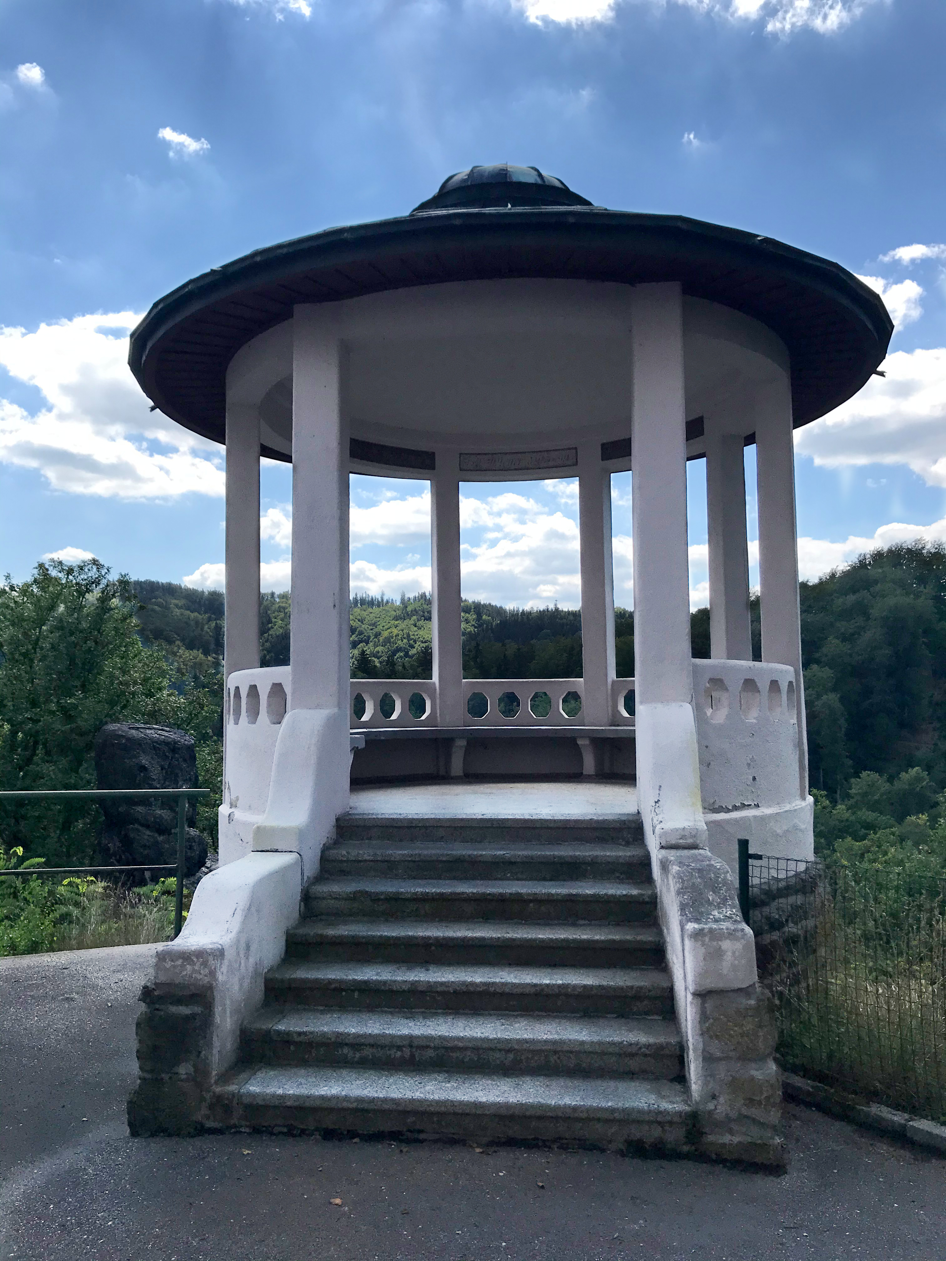 Vyhlídkový altán "Vídeňské sedátko" v Karlových Varech u hotelu Imperial